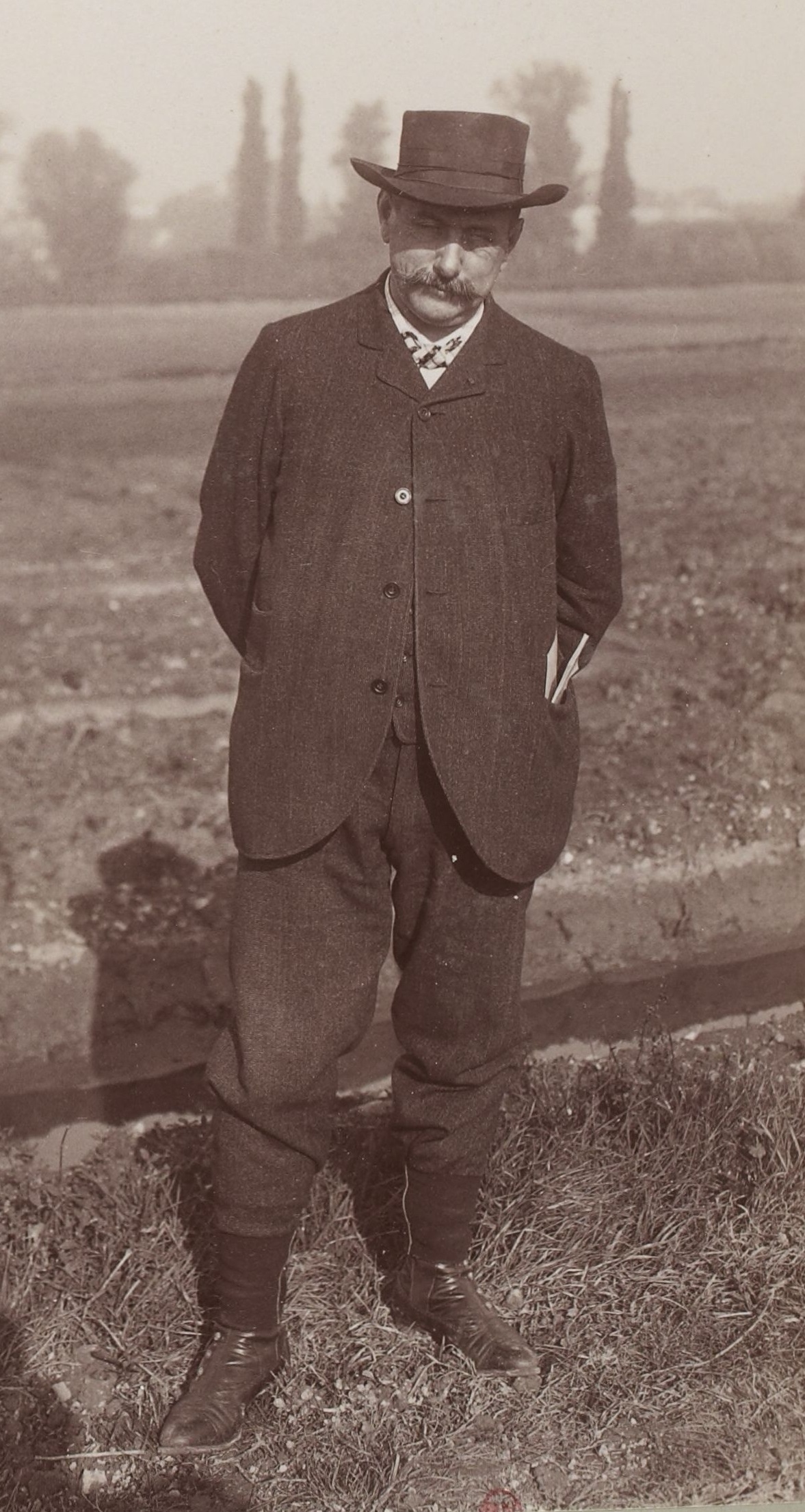 [Collection Jules Beau. Photographie sportive] : T. 16. Années 1901 et 1902 / Jules Beau : F. 8v. [Sans titre] ; Pierre Giffard